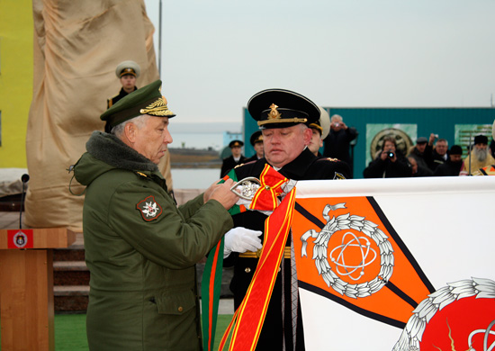 Первый заместитель Министра обороны генерал армии Аркадий Бахин прикрепляет Орден Суворова на знамя Центрального полигона Российской Федерации, расположенному на архипелаге Новая Земля